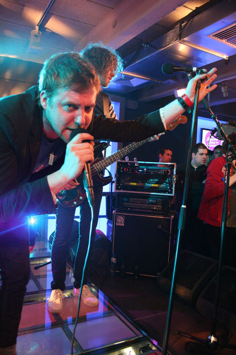 Zanger Ricky Wilson van de Engelse band Kaiser Chiefs, met op de achtergrond bassist Simon Rix, bij hun optreden voor het MTV programma Brand New Live in Rotterdam op 5 maart 2006